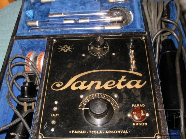 historický violet wand